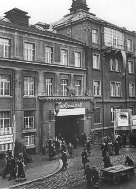 Dresden, Werkstor der SAG-Sachsenwerke Niedersedlitz Zentralbild Höhne-Pohl 7.12.1953 SAG-Sachesenwerke Niedersedlitz, Dresden UBz: Werkeingang.